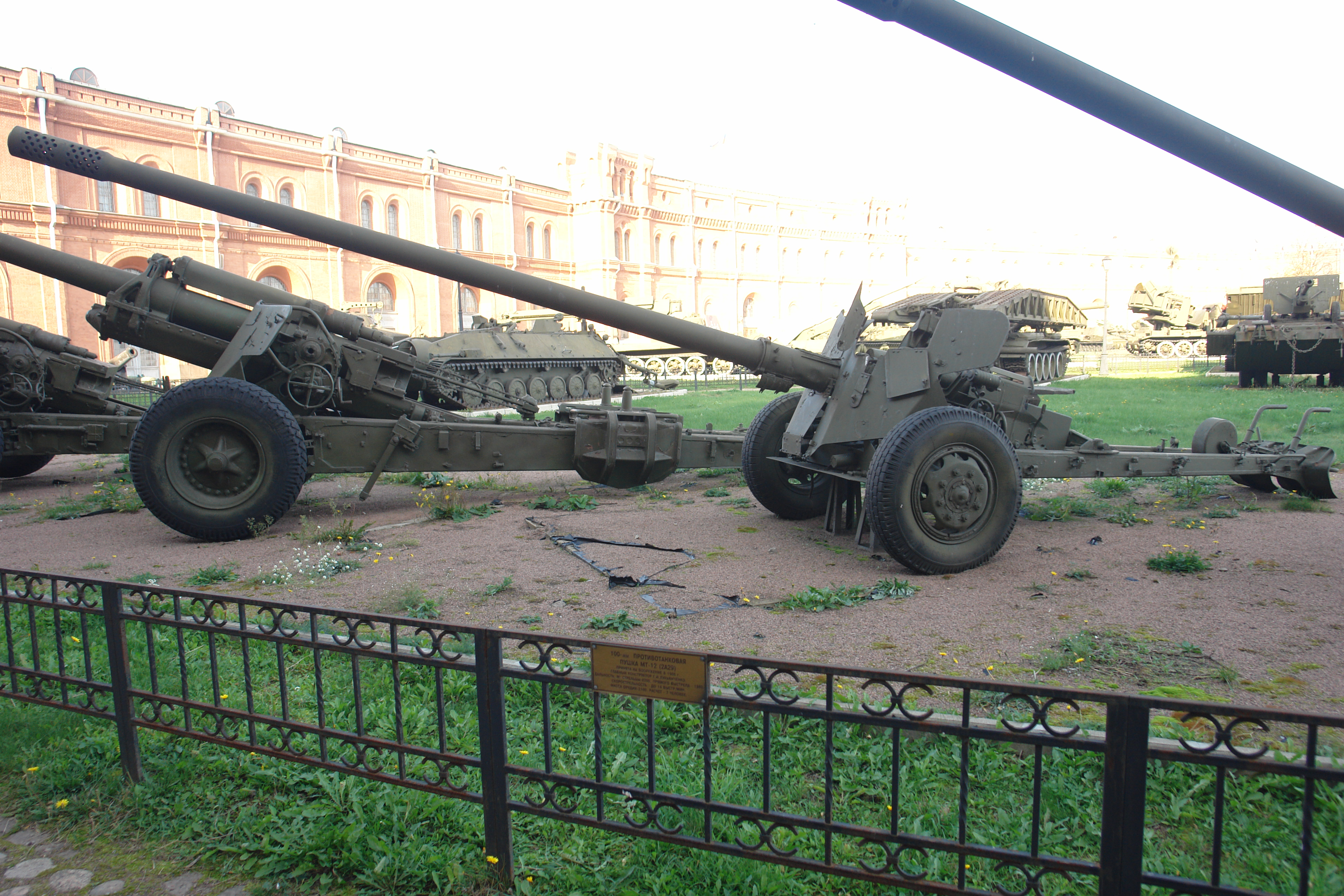 100-мм ПРОТИВОТАНКОВАЯ ПУШКА МТ-12(2А29) ПРИНЯТА НА ВООРУЖЕНИЕ В 1968 г. ГЛАВНЫЙ КОНСТРУКТОР Г.И.ЛУКЬЯНЧЕНКО. ДАЛЬНОСТЬ, М: СТРЕЛЬБЫ-8200, ПРЯМОГО ВЫСТРЕЛА - 1880. СКОРОСТРЕЛЬНОСТЬ - ДО 14 ВЫСТР/МИН МАССА ОРУДИЯ-3100. РАСЧЕТ 7 человек Военно-исторический музей артиллерии, инженерных войск и войск связи, Санкт-Петербург.